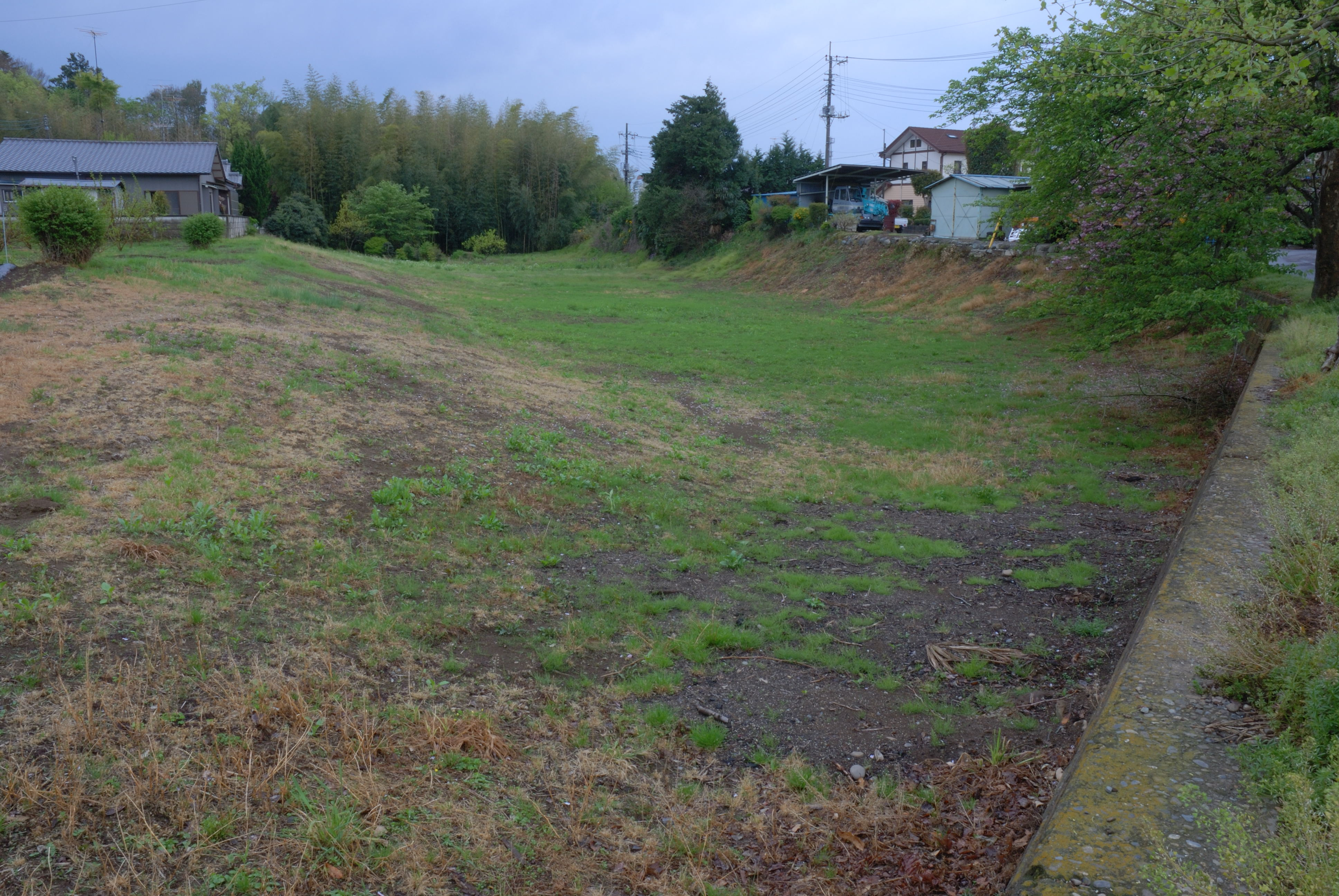 Mijo karabori